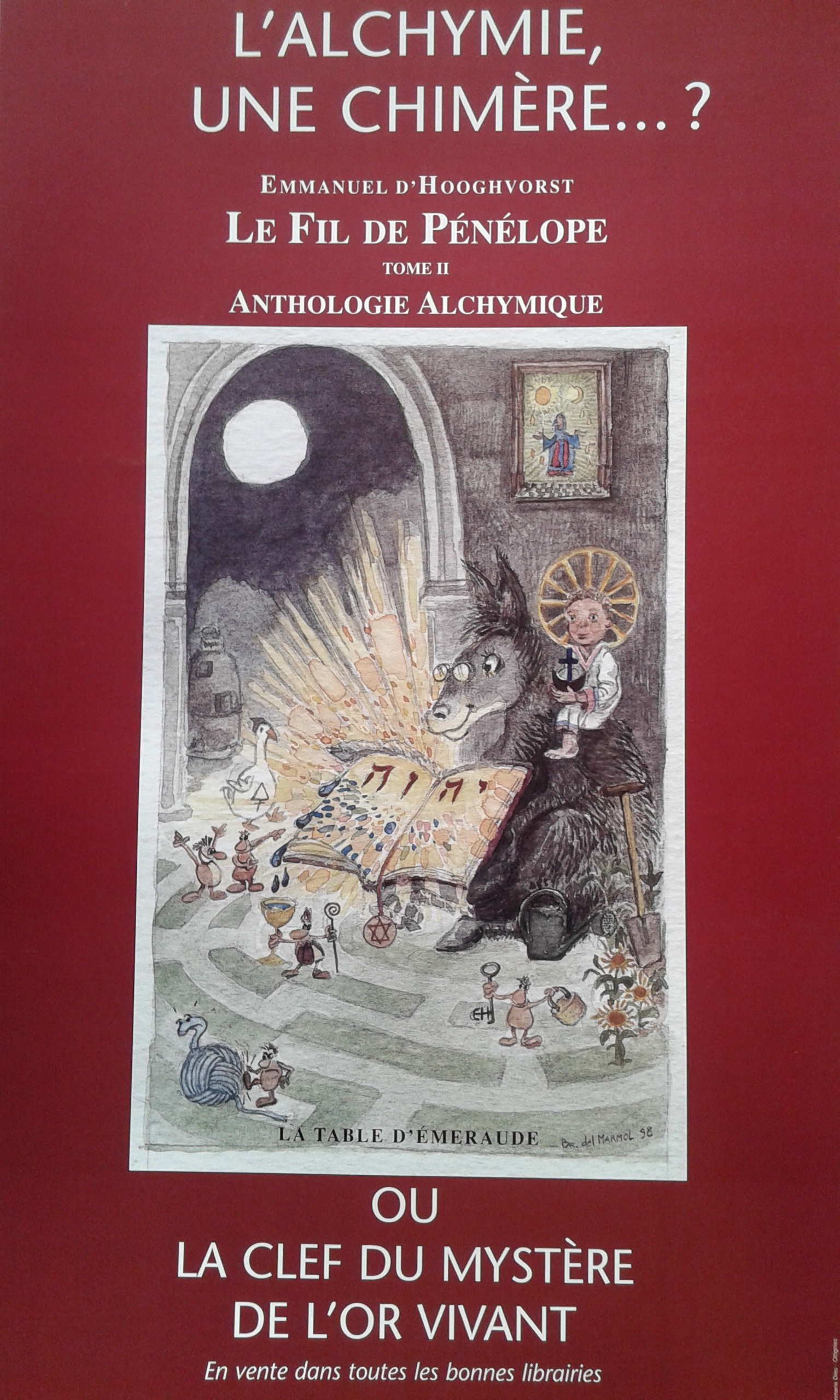 Affiche annonçant la sortie du Fil de Pénélope, t. II.